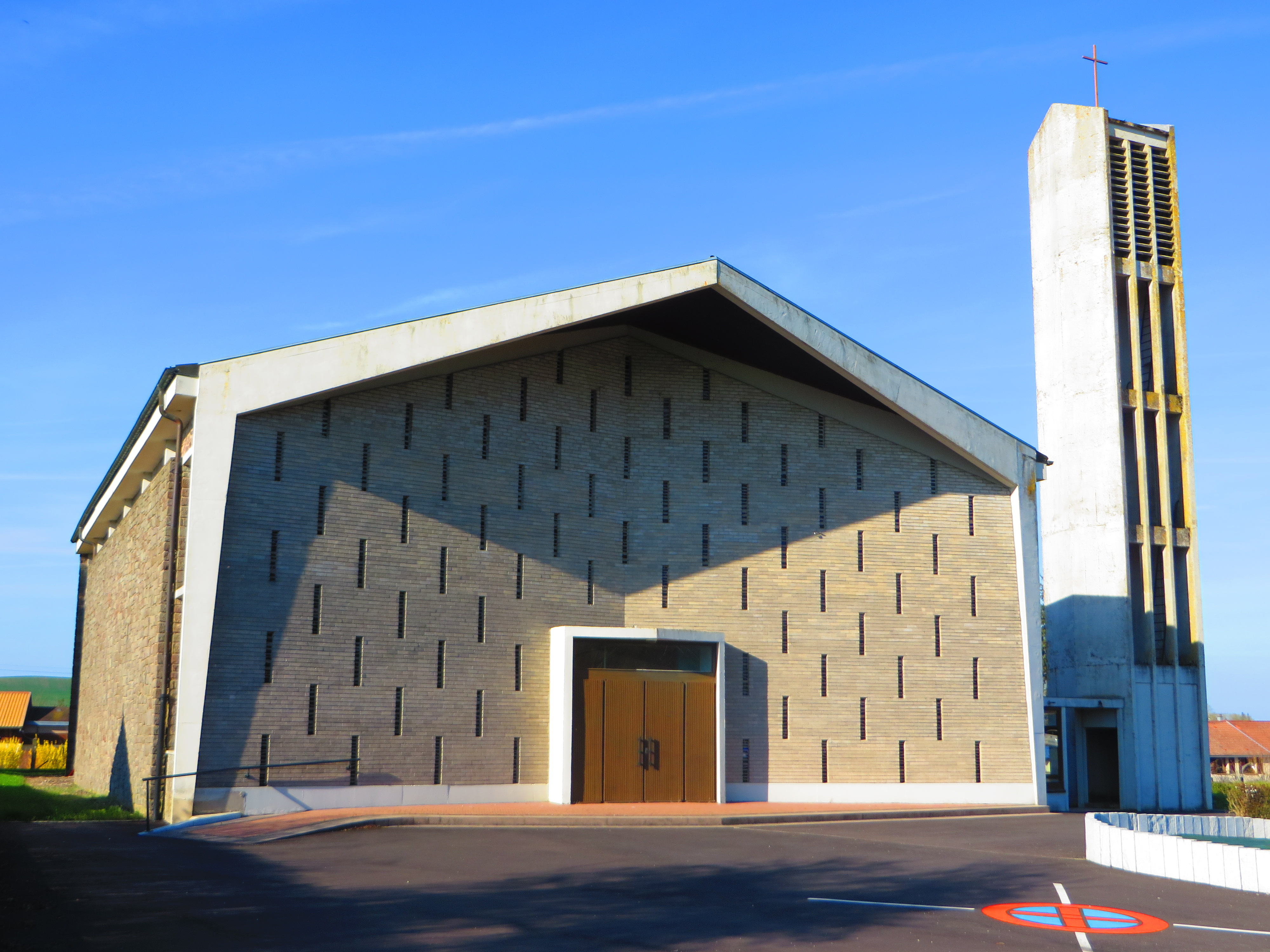 Nébing Église Saint-Clément